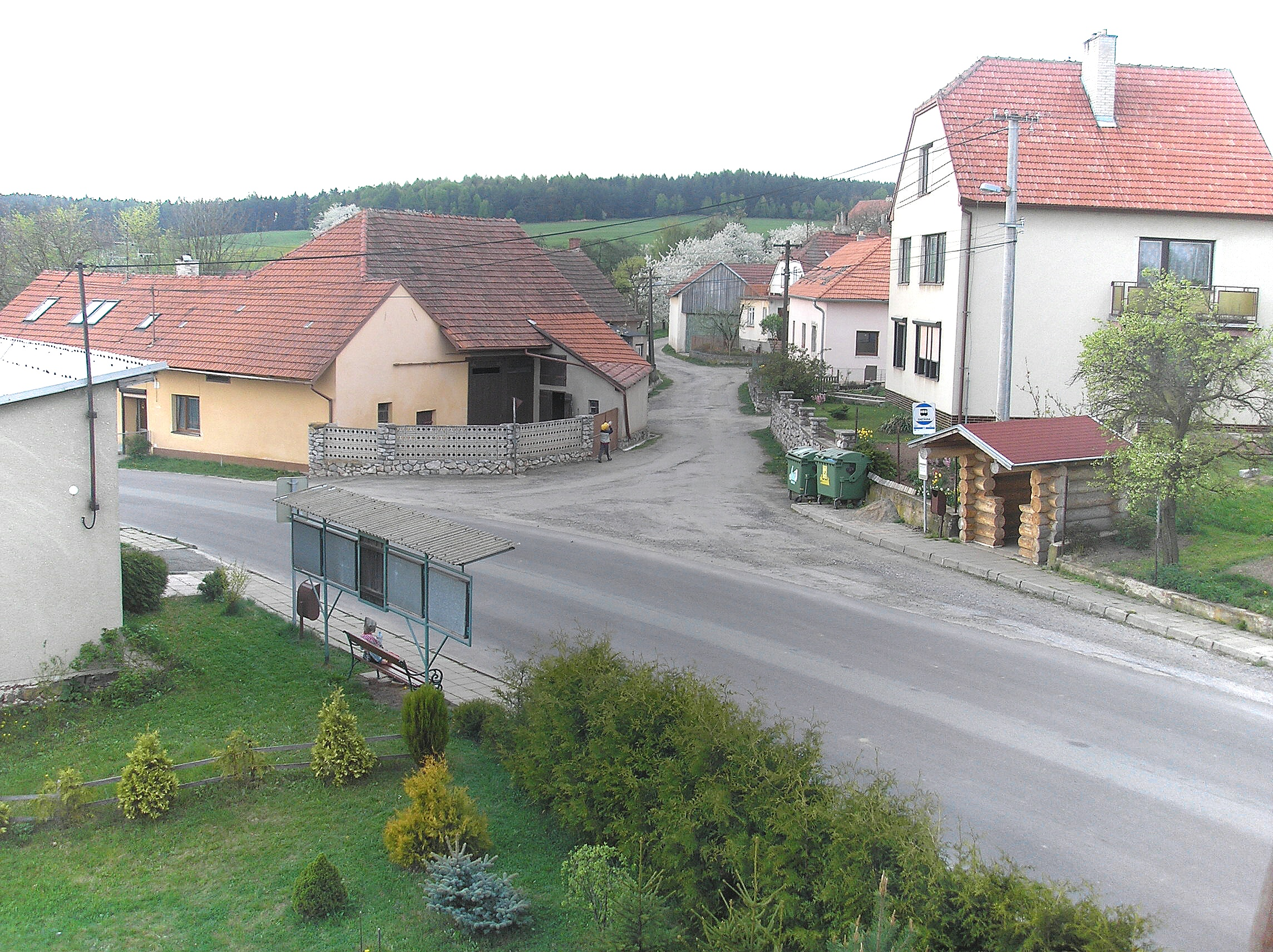 Střed obce s autobusovou zastávkou a obecním úřadem